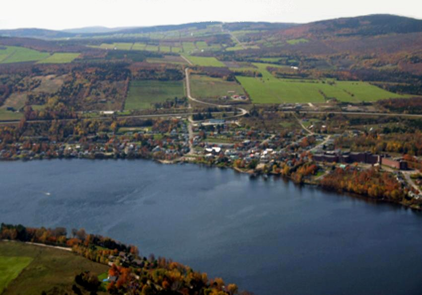 vue aérienne de Saint-Ferdinand et les environs